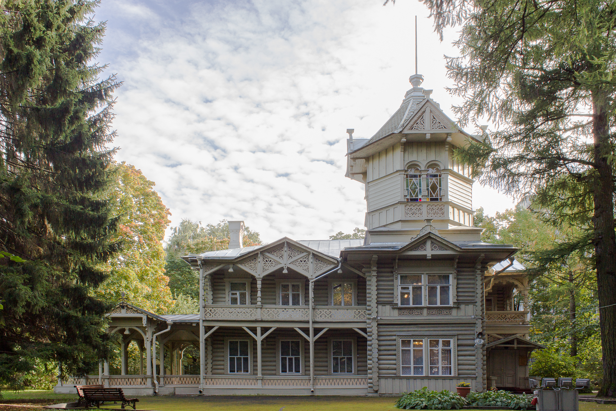 Дом, где 16 октября 1917 года ЦК РСДРП(б) принял решение о вооруженном восстании: улица Болотная, 13, Выборгский район, Санкт-Петербург